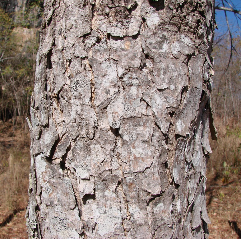 Myracrodruon urundeuva (Astronium urundeuva) - ANACARDIACEAE Parque Estadual de Terra Ronca - São Domingos - Goiás - Brasil.